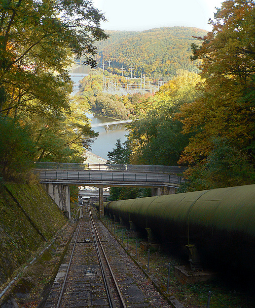 Peterskopfbahn